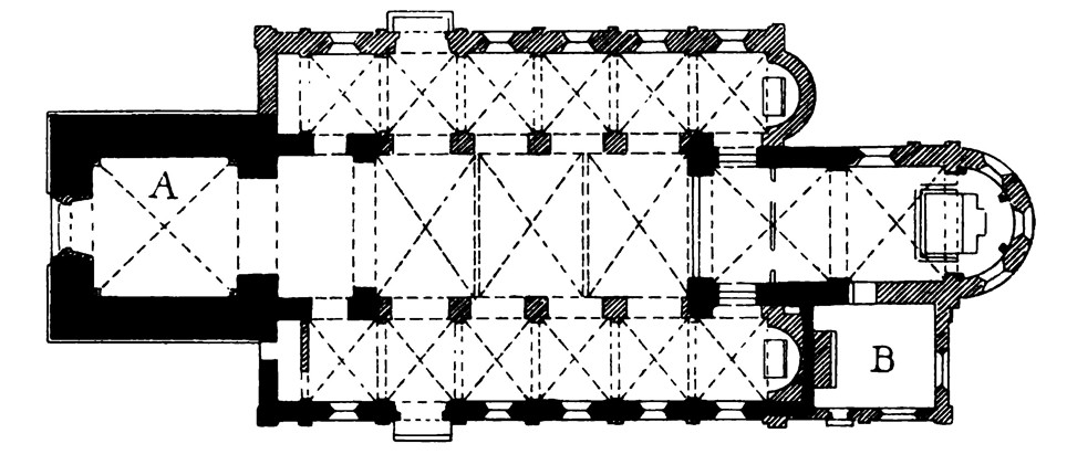 St. Gereon Monheim vor Neubau